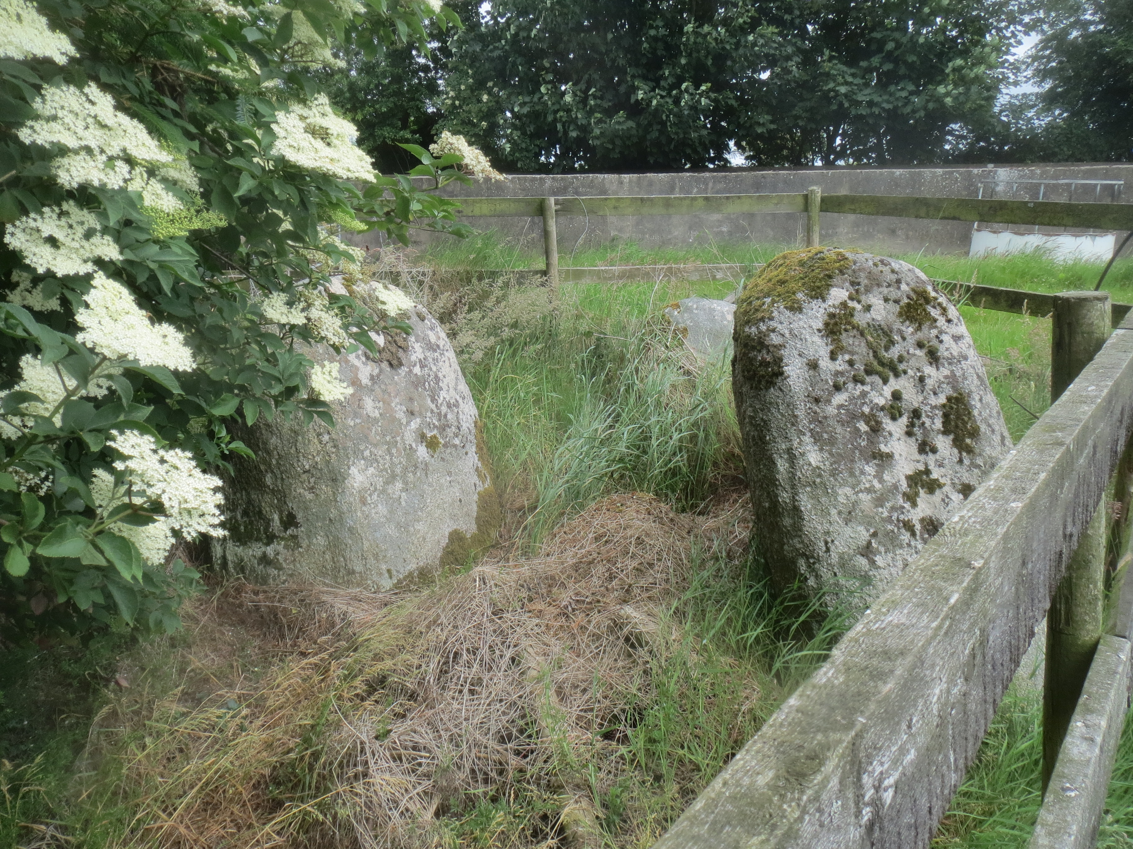 Portal Tomb von Enagh Beg